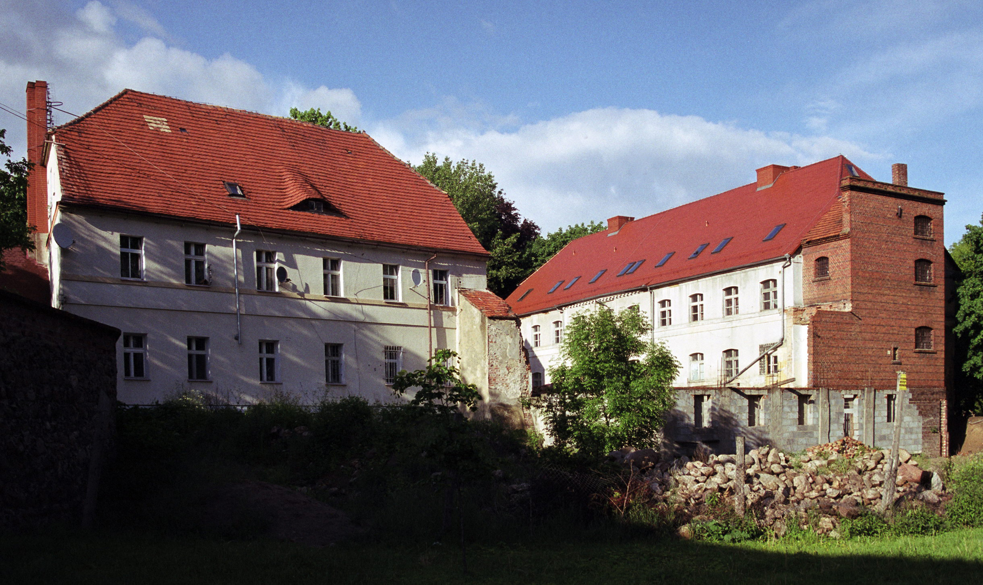 Dom z reliktami zamku, mur., XIV, XIX Wschowa, ul. Zamkowa 7, Wschowa